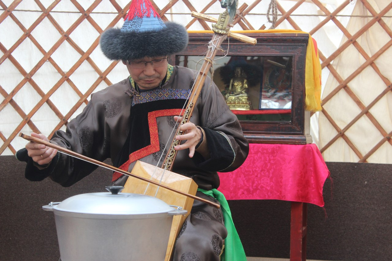 Проект "Юрта улигершина"